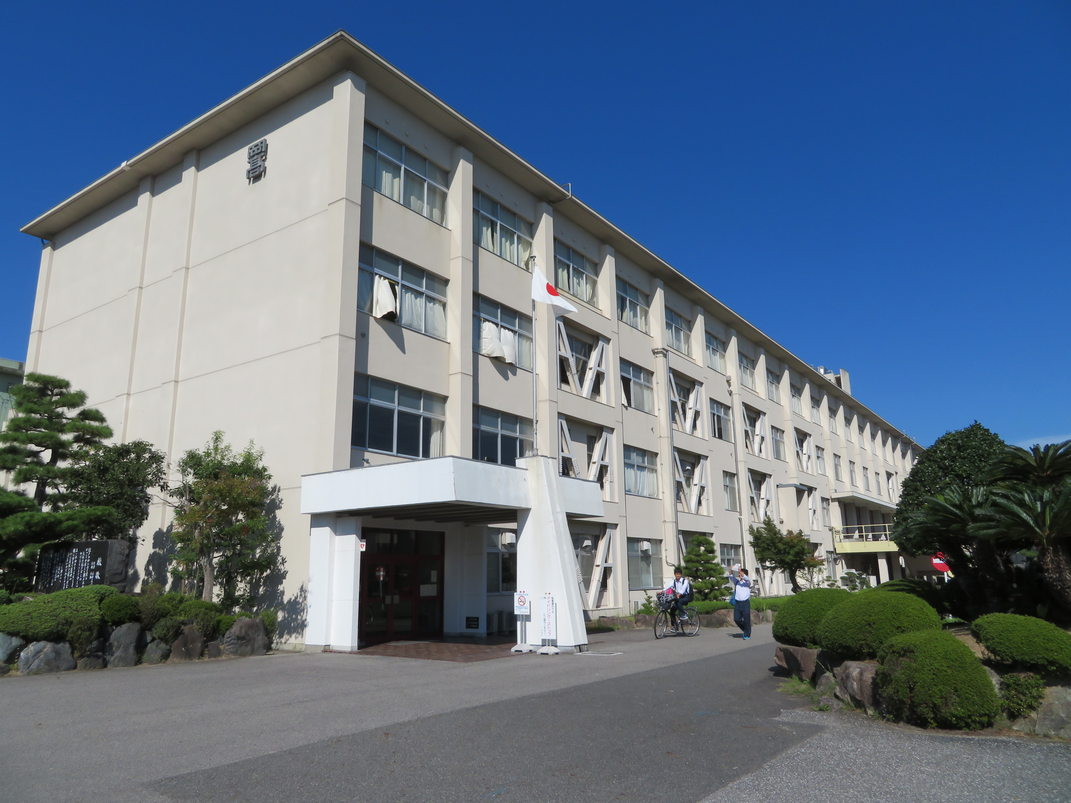 愛知県立岡崎高等学校